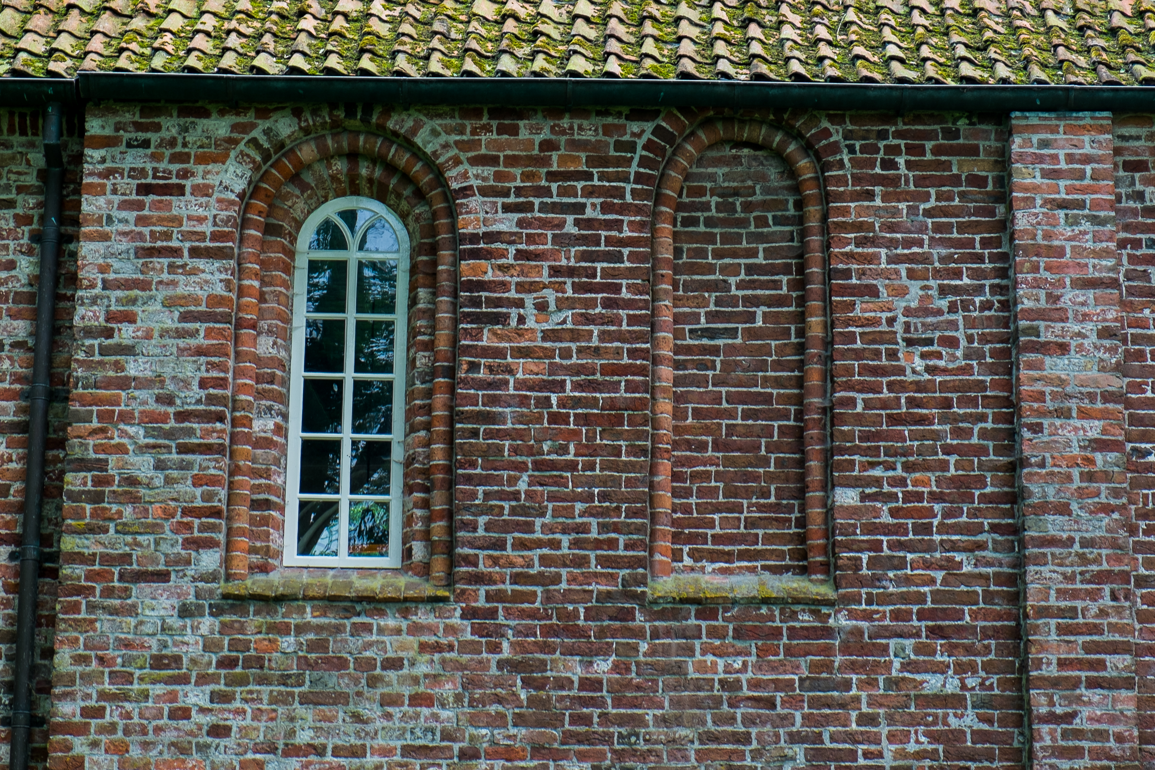 Venster en spaarveld met doorsneden toppen (als gevolg van verlaging van de kap rond 1620) in de noordmuur van de kerk van Leegkerk.